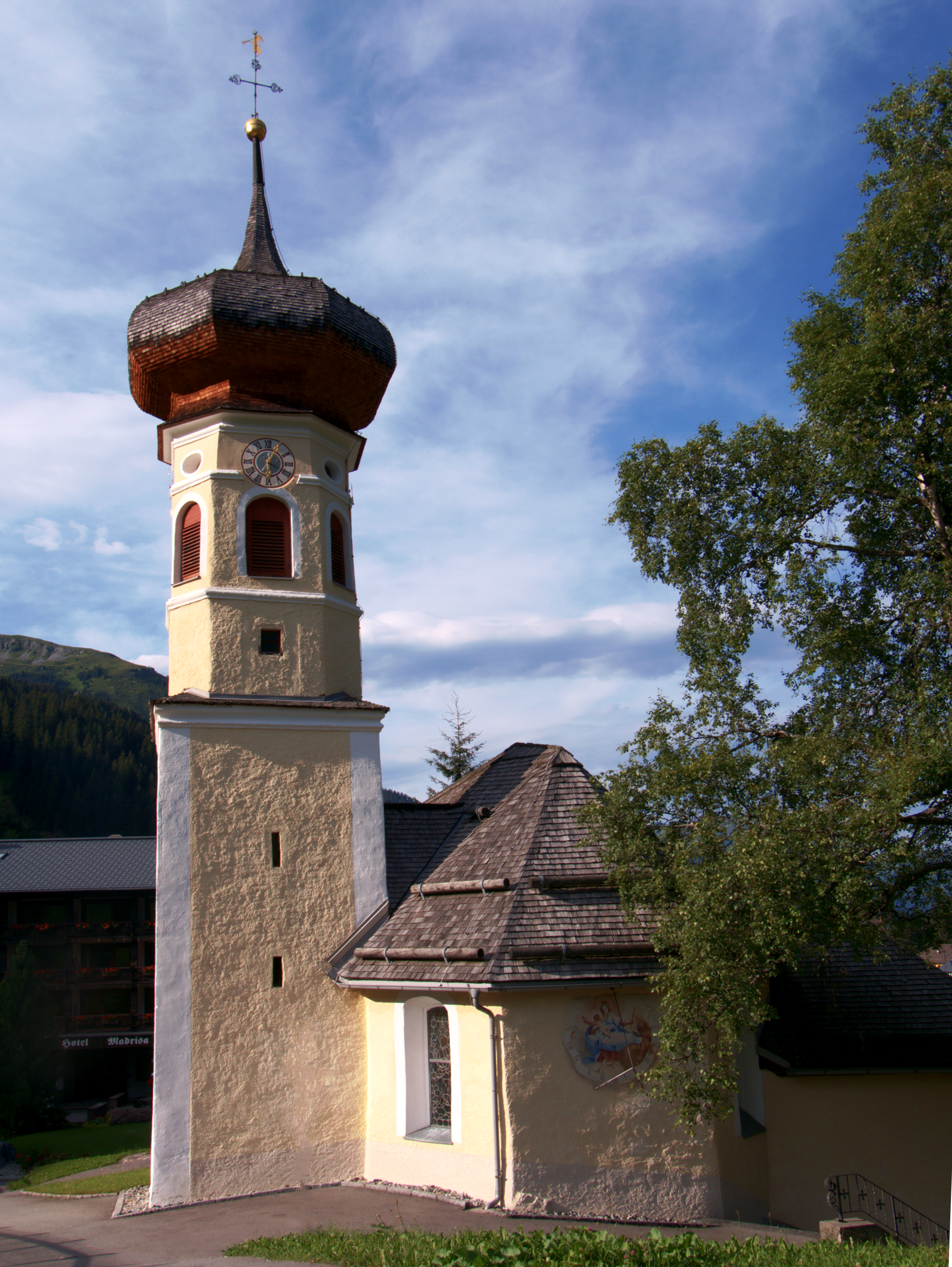 Kuratiekirche St. Maria Magdalena (Gargellen) von Westen